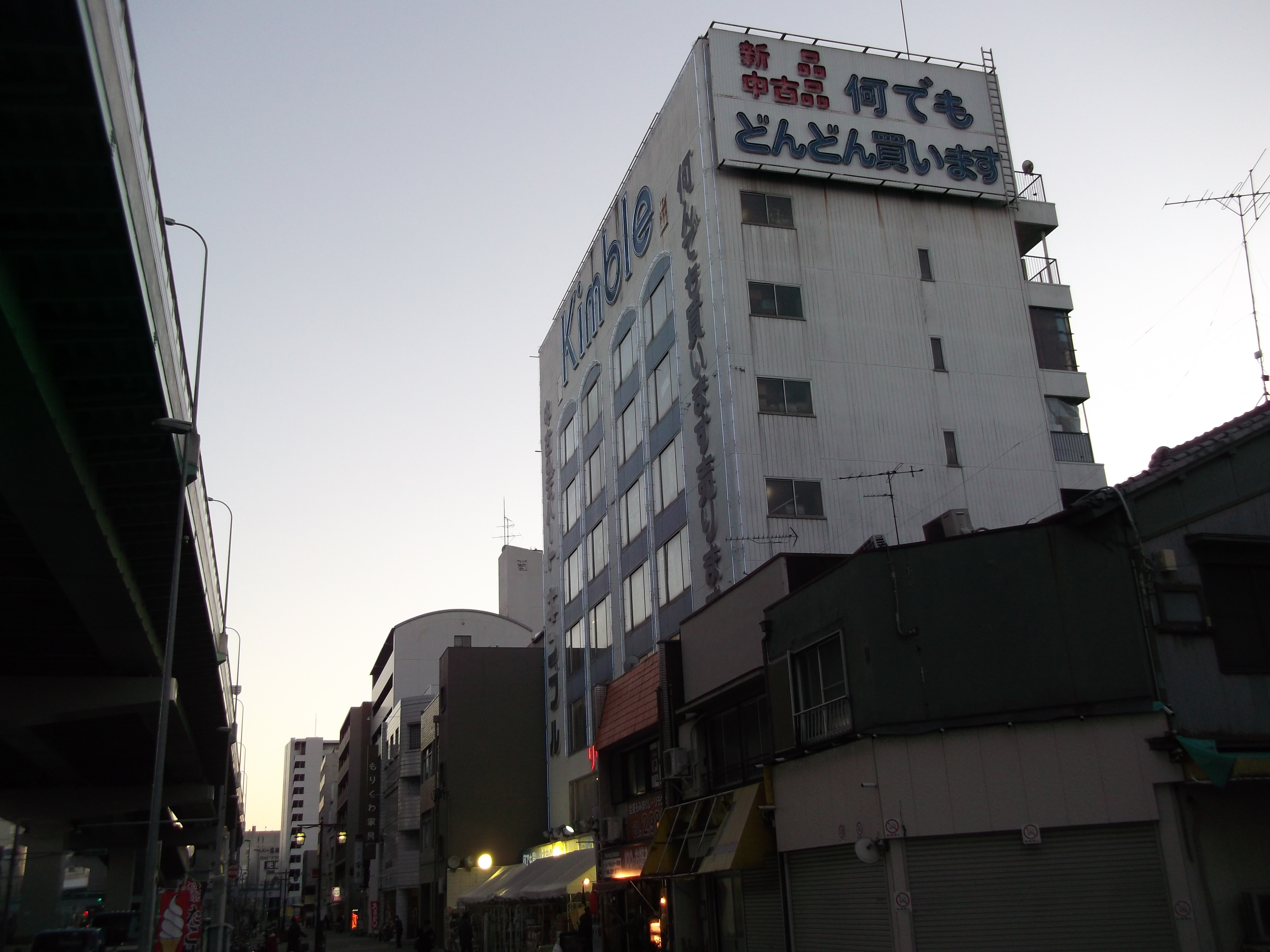 名古屋市西区新道にあるキンブル市内店を北東側から写す